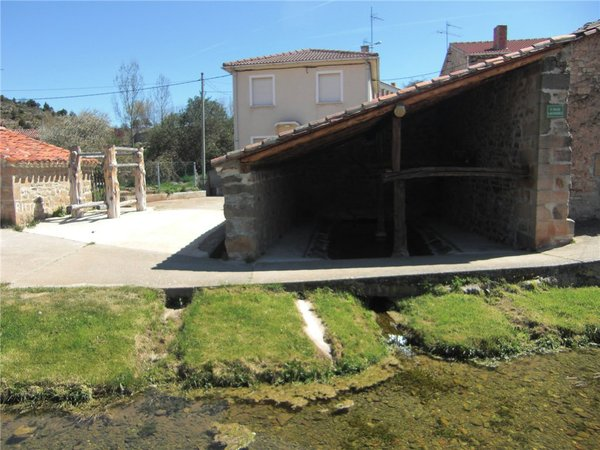 lavadero y potro de singular belleza situado en el centro del pueblo